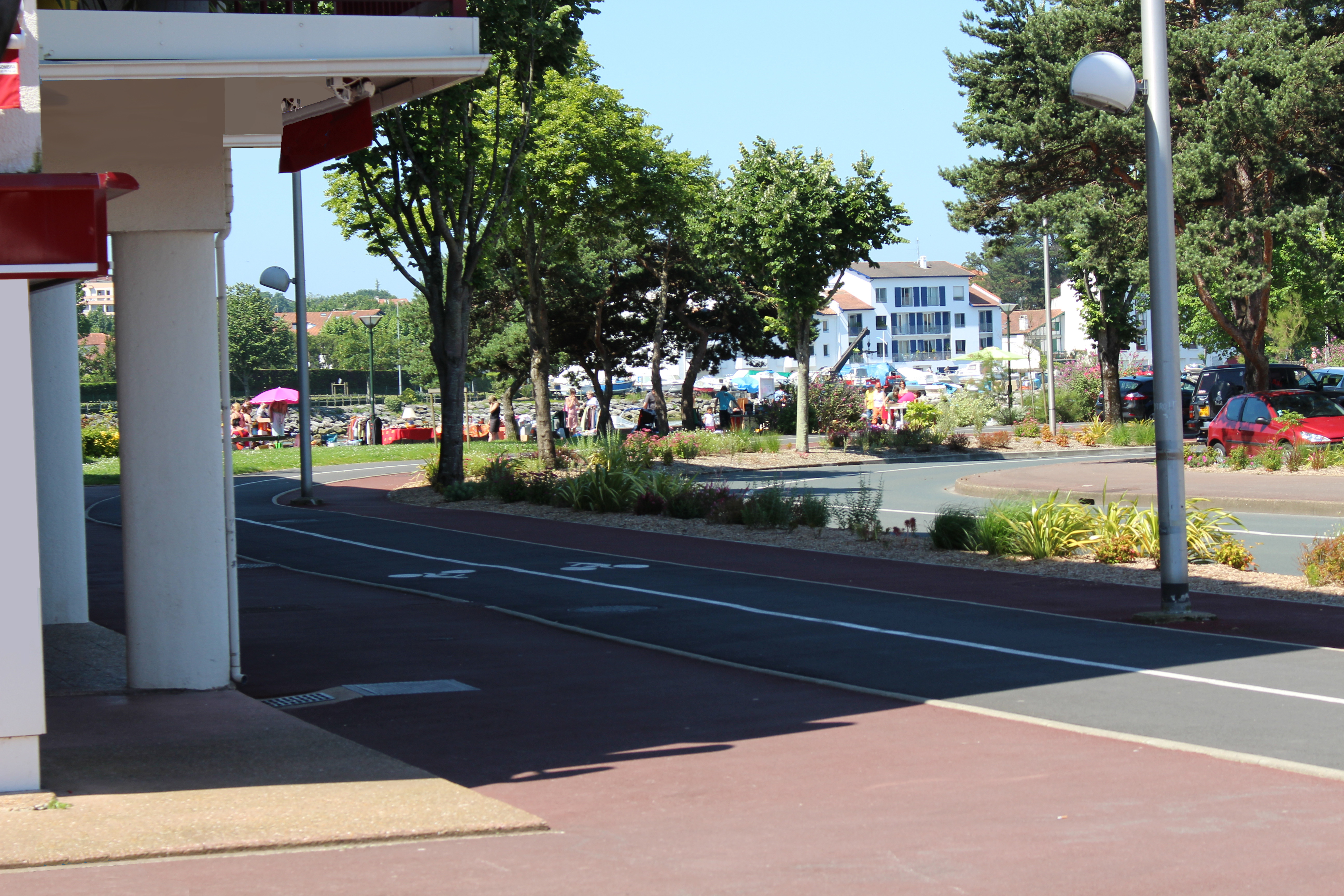 Piste cyclabe de Saint-Jean-de-Luz à Urdazuri